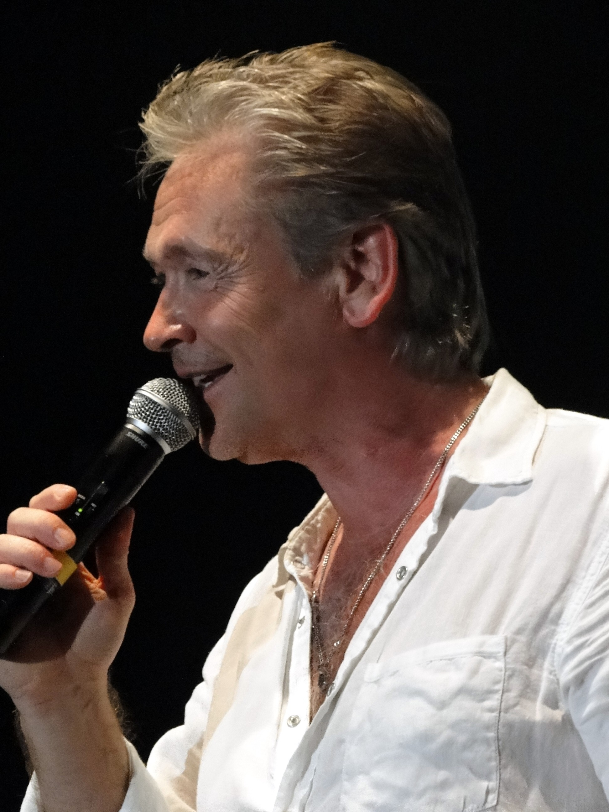 Olaf Berger 2012